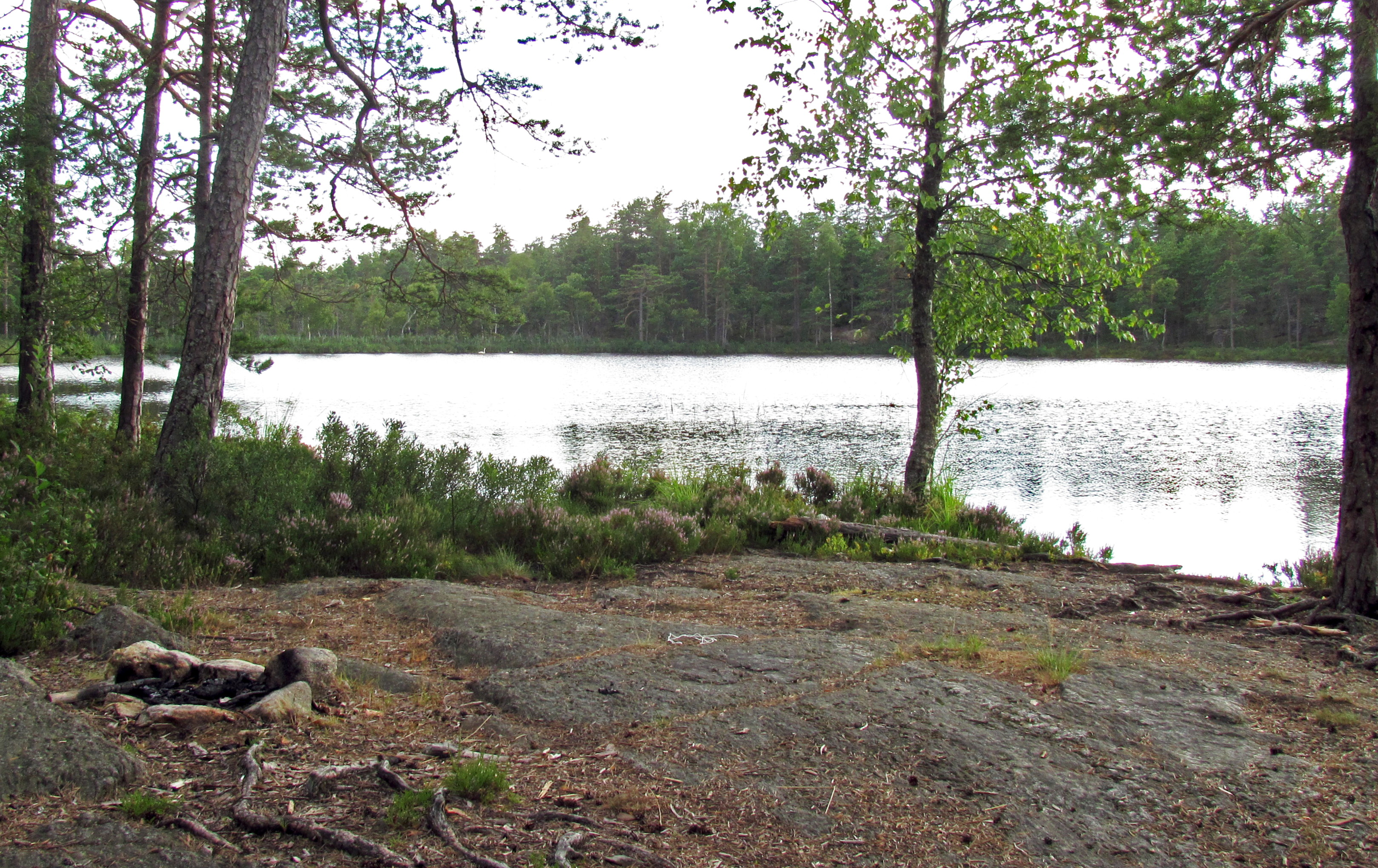 Svartsjön, Hanveden